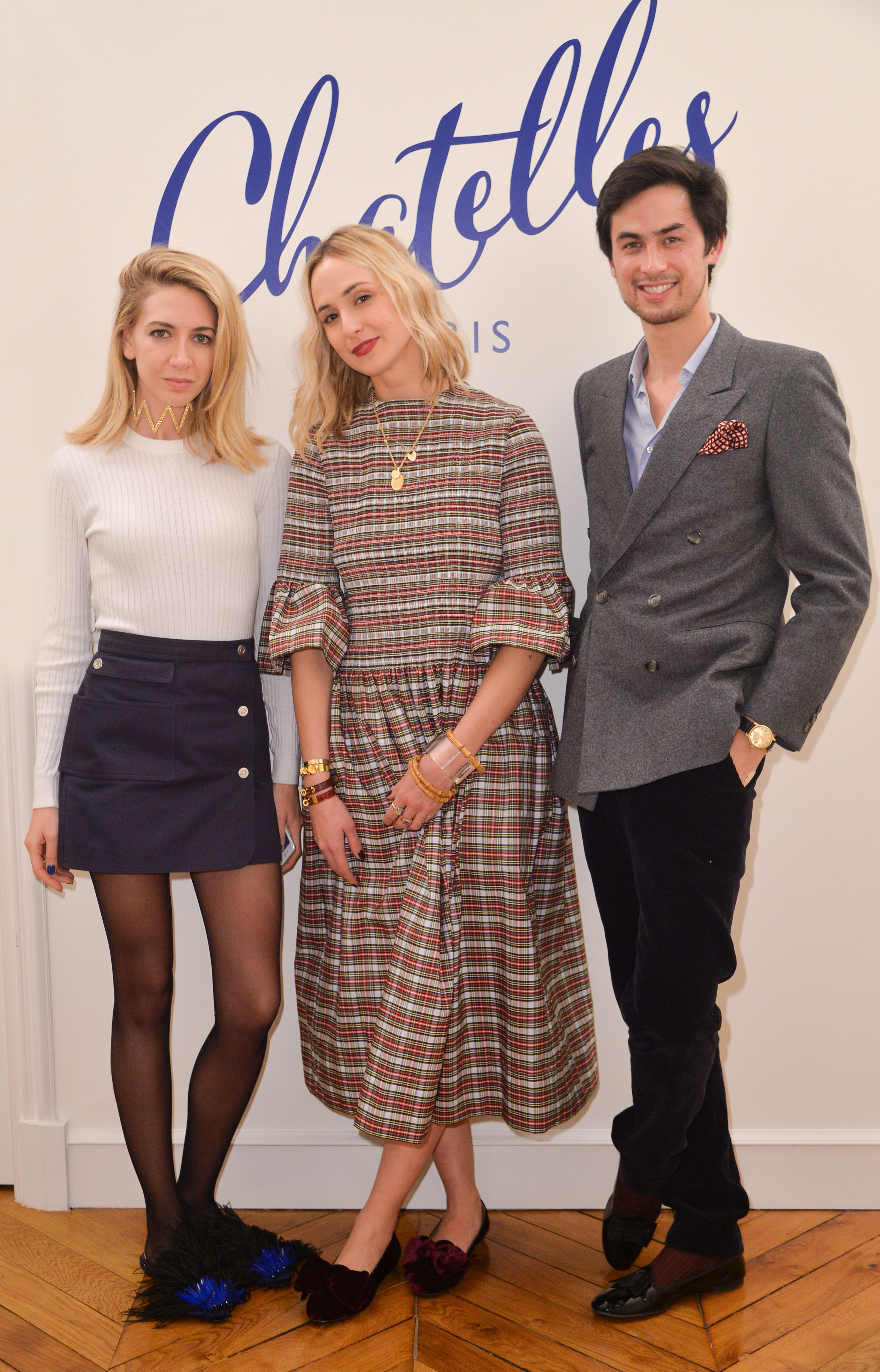 De gauche à droite : Sabine Getty, dessinatrice de bijoux, Elisabeth von Thurn und Taxis, rédactrice chez Vogue, François du Chastel, fondateur de la marque Chatelles.